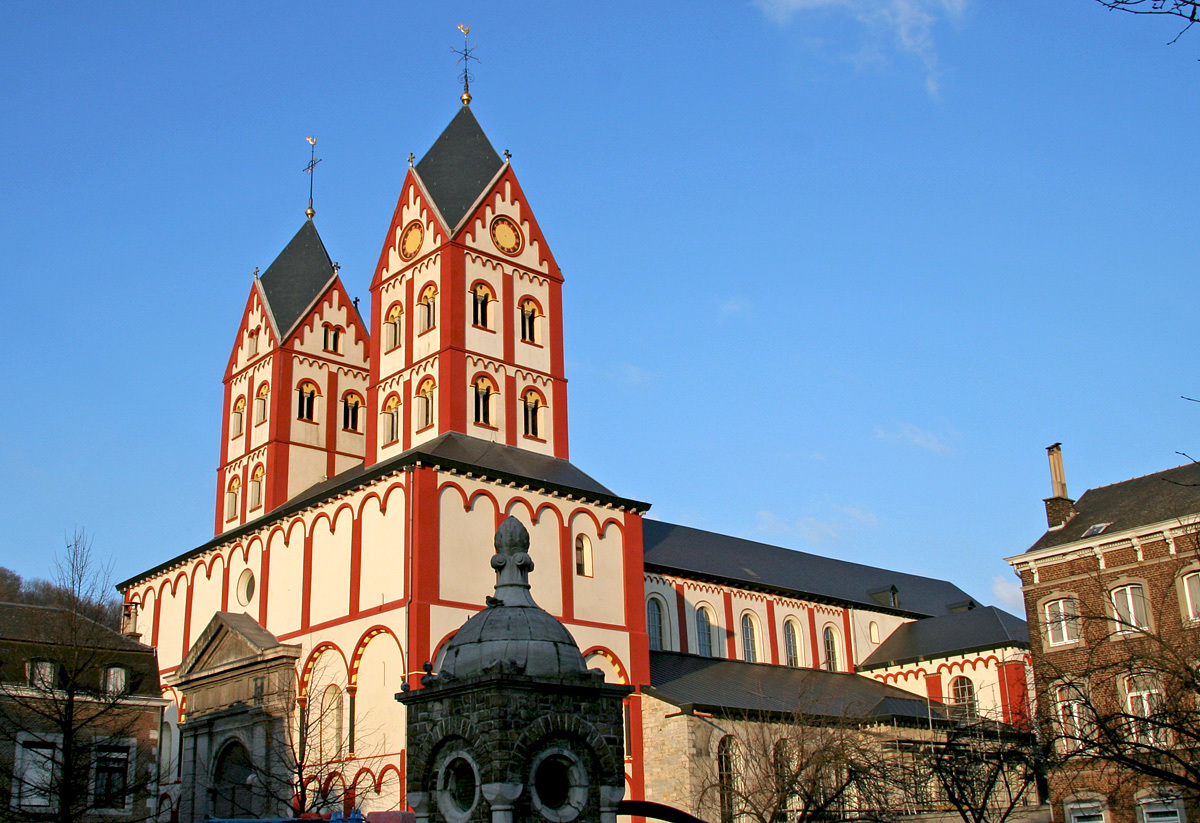 Vue de l'Eglise Collégiale de St. Barthelemy à Liège